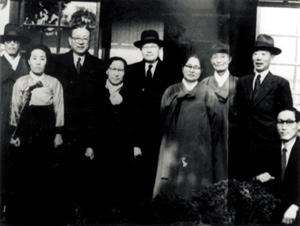 한국의 정치인 장면, 박순천, 조병옥, 곽상훈, 신익희, 신창현 외